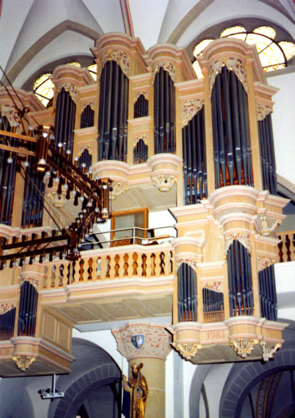 Orgel in der Pfarrkirche St. Blasius in Balve